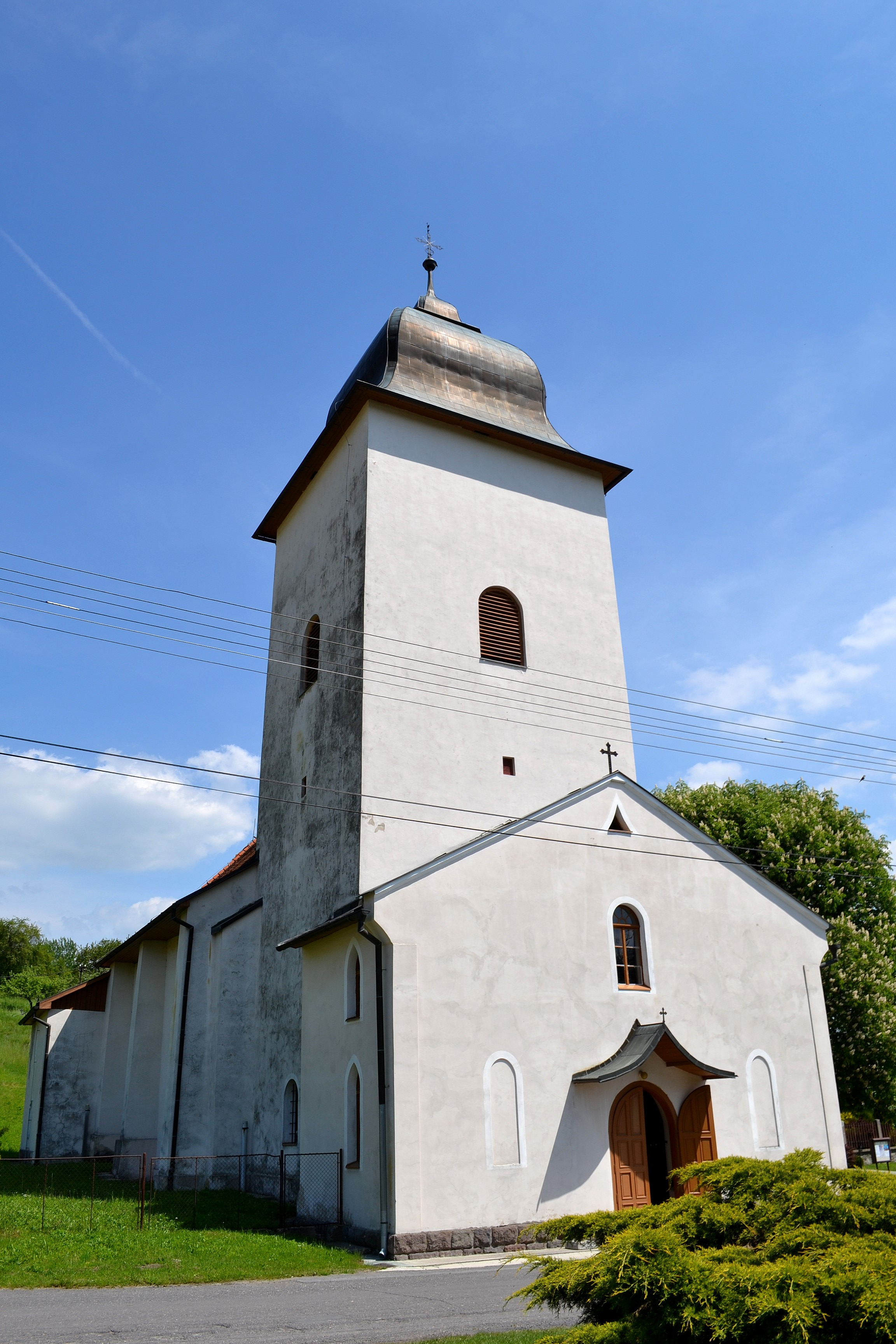 Janova Lehota (okr. Žiar nad Hronom), Kostol Najsvätejšieho Srdca Ježišovho; celkový pohľad